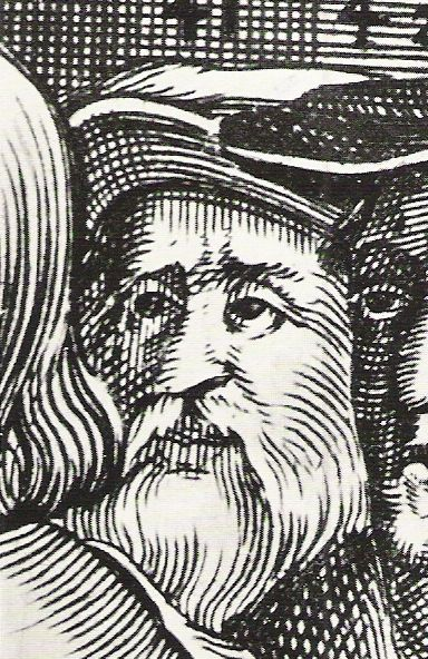 Sebastian Hofmeister am fiktives „Fraumünsterkonzil“ (Ausschnitt)